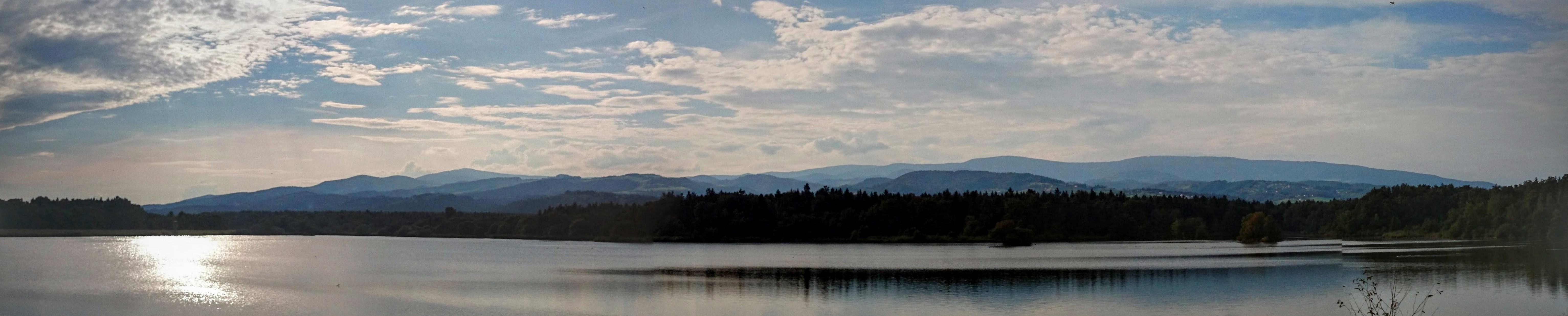 Pogled na Pohorje iz Krajinskega parka Rački ribniki - Požeg, pri akumulaciji Požeg.